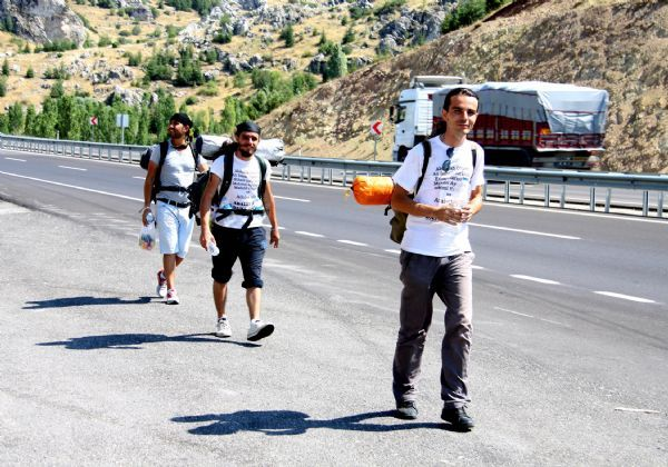 Adalet Yürüyüşü Burdur'a girerken